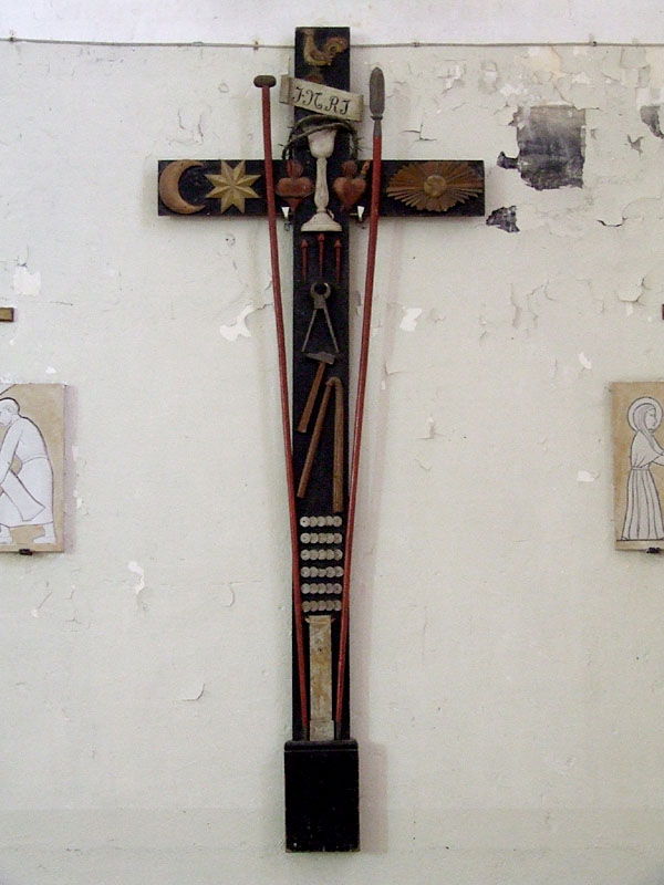 Croix près du baptistère de l'église d'Étais-la-Sauvin (Yonne). Cette croix regroupe tous les instruments de la Passion du Christ